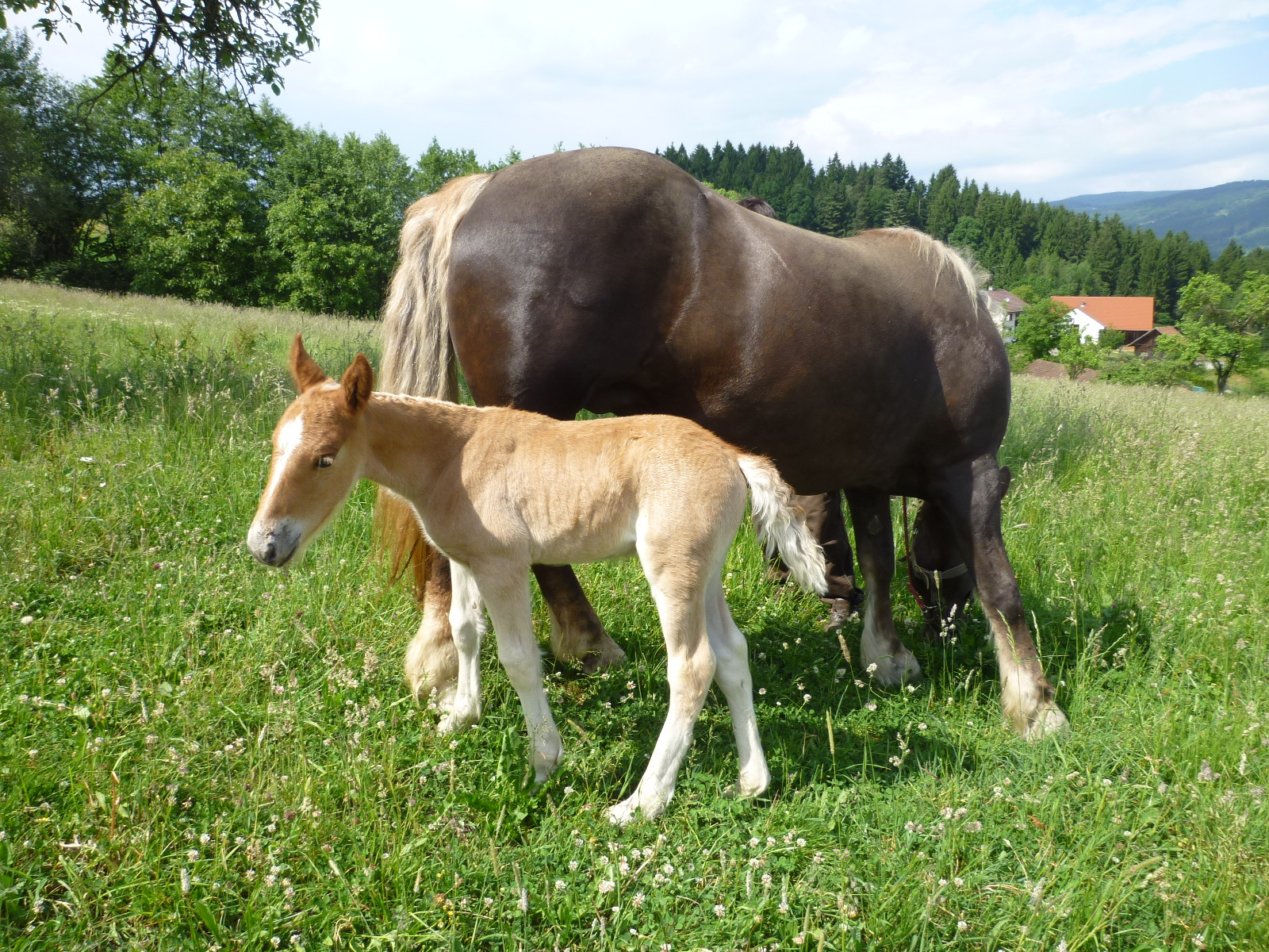 eine Kaltblutstute grast mit ihrem Hengstfohlen auf einer Wiese; Kaltblutpferde werden nach wie vor zur Waldarbeit im Bayerischen Wald eingesetzt; Perasdorf, Niederbayern; Naturpark Bayerischer Wald